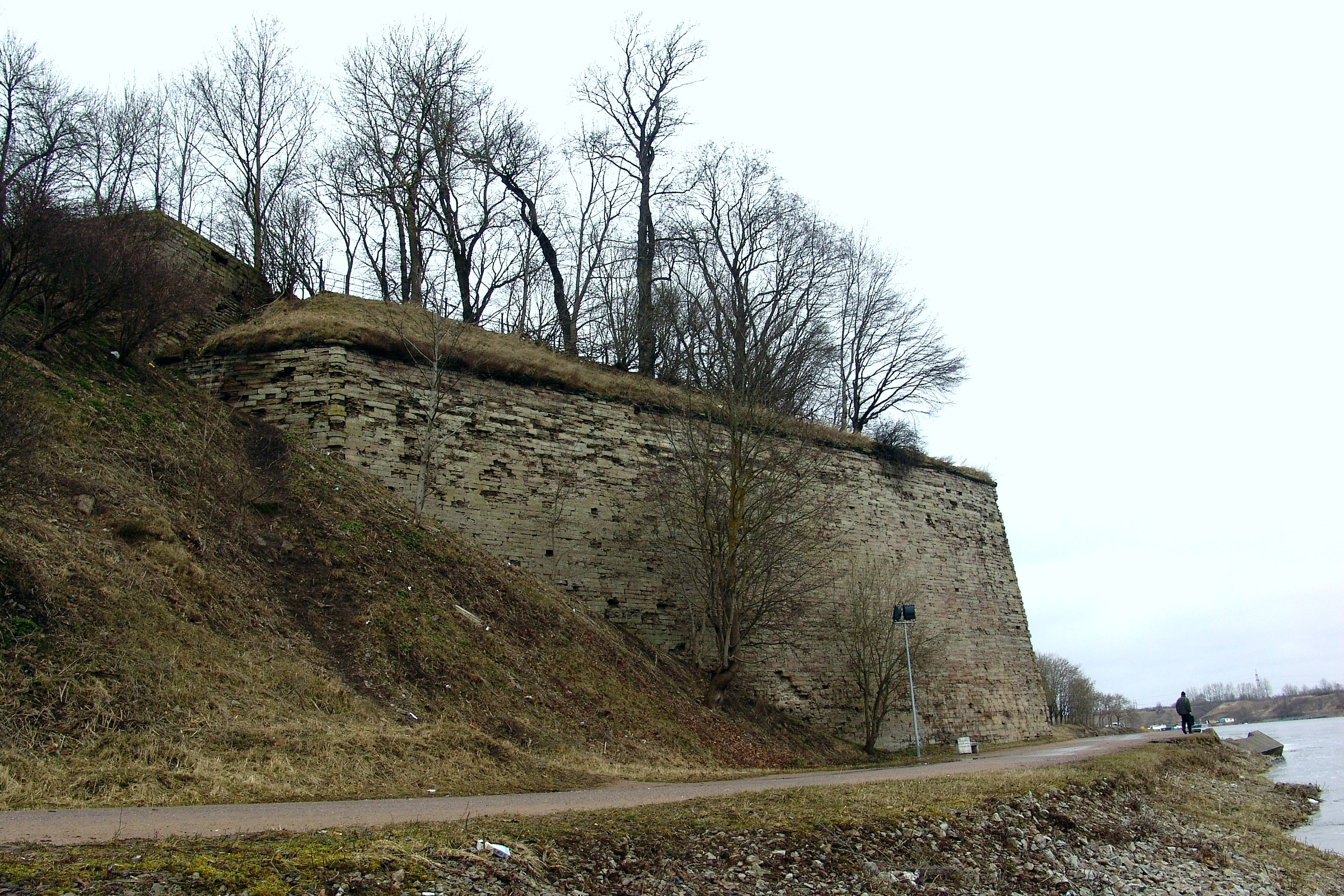 Бастион Пакс